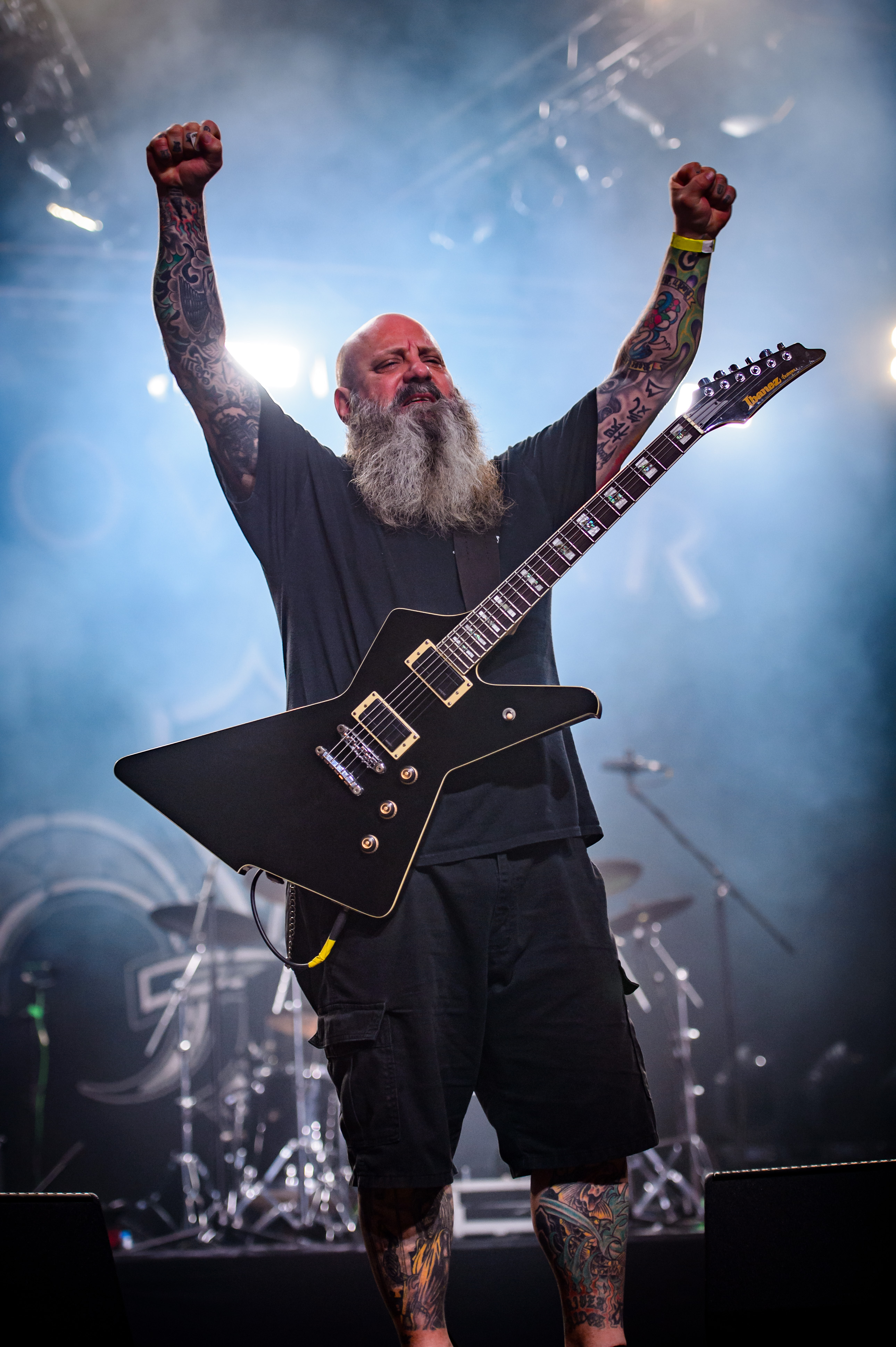 'Wacken Open Air 2017; Wacken': 'Crowbar'